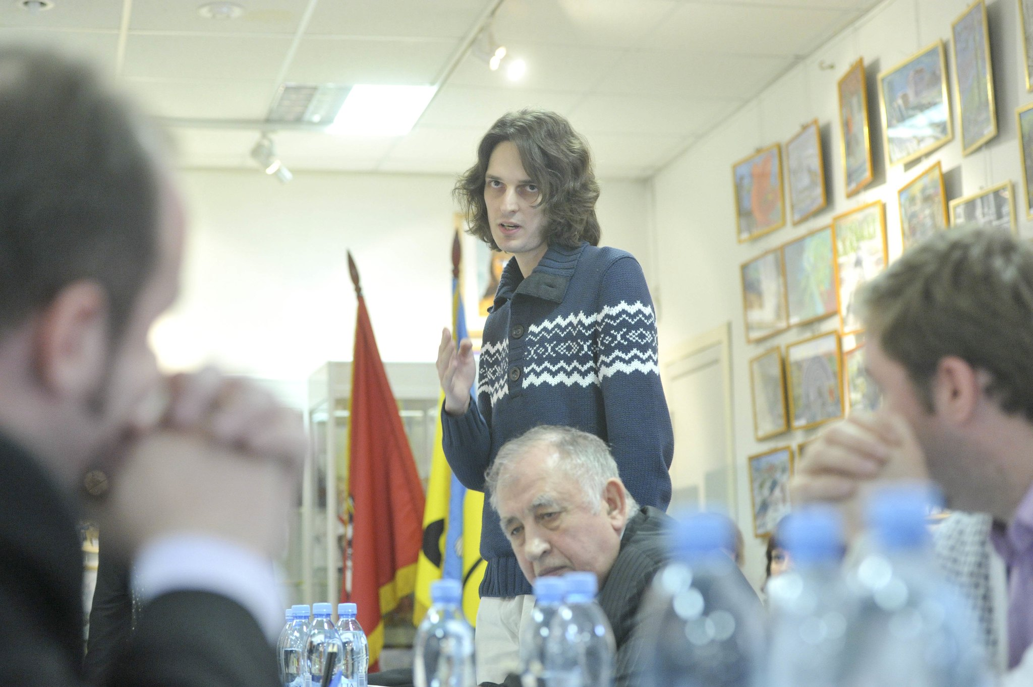 Максим Кац 2012